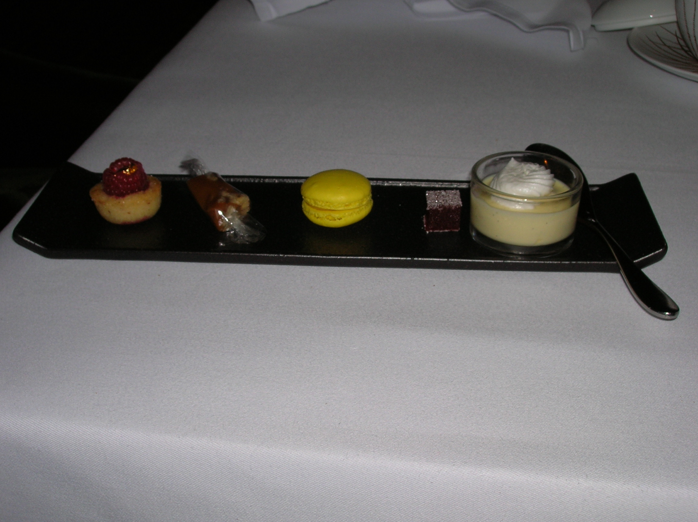 קינוחים במסעדת קפריס בהונג קונג